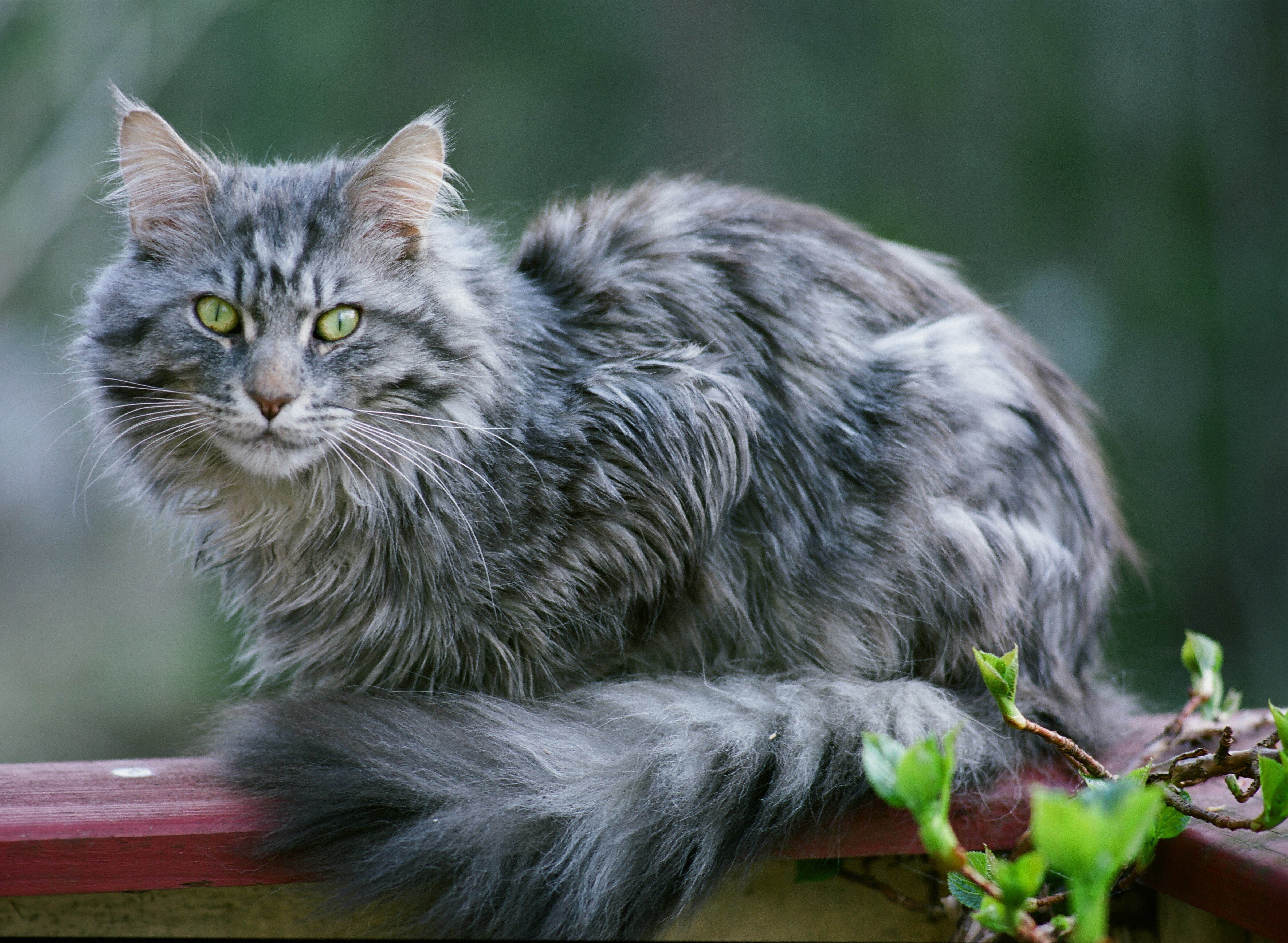 Maine Coon. Dusker på ørene. Tydelig stopp. Kassehake.